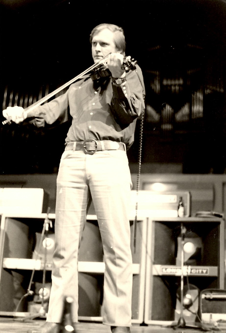 Optreden in Ahoy met de Flying Burrito Brothers in 1970